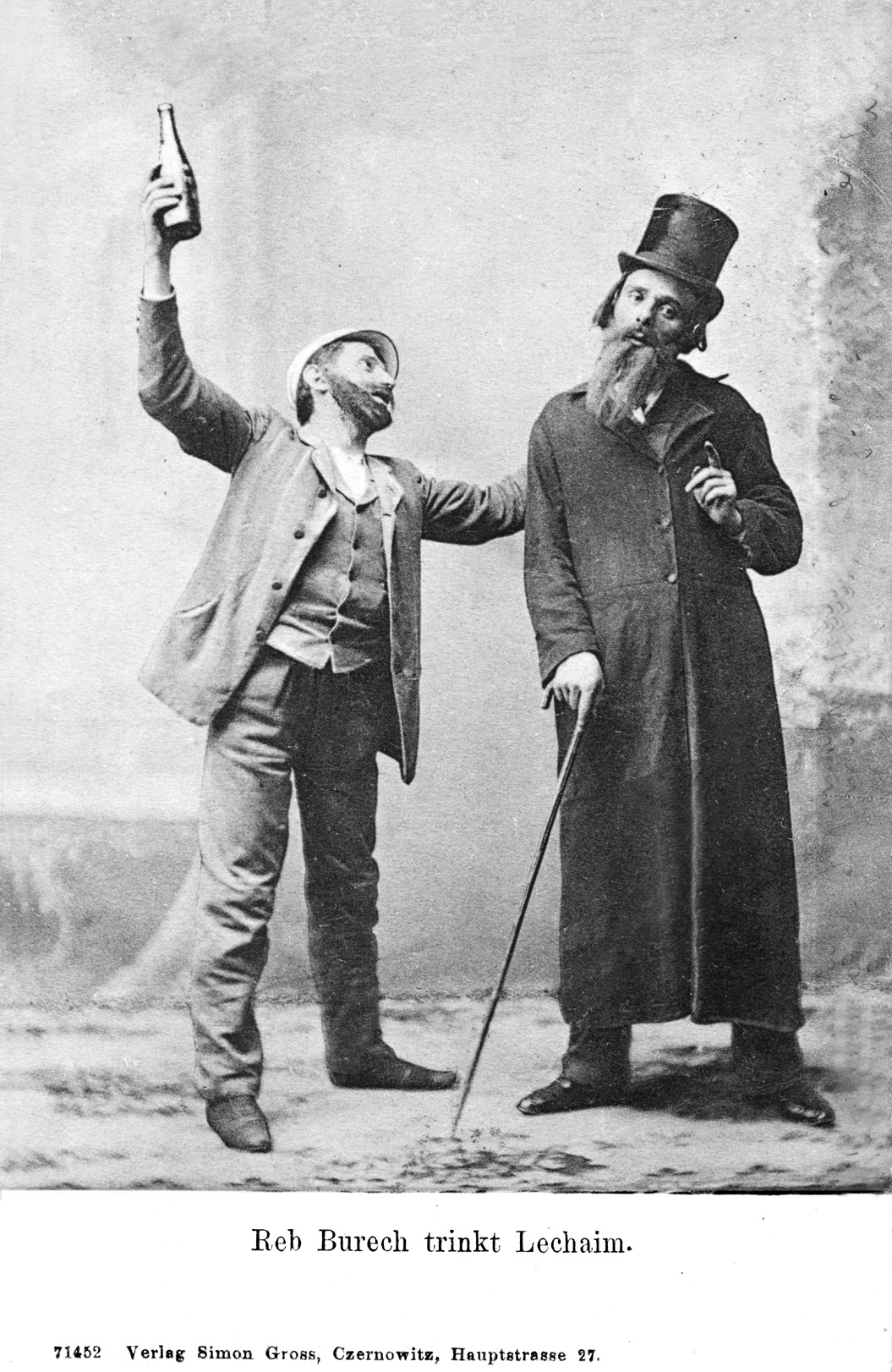 Reb Burech trinkt Lechaim - Jewish folklore